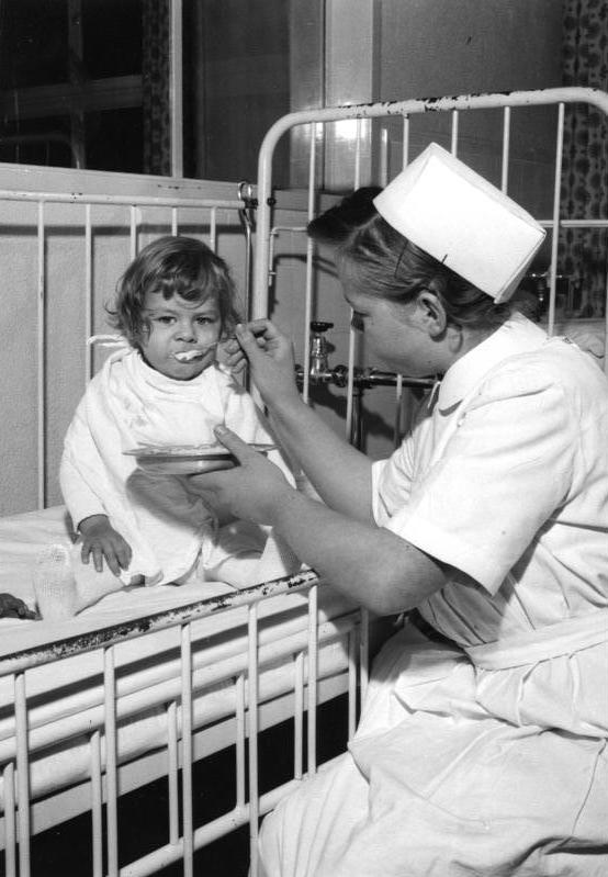 Universitäts-Kinderklinik, Bonn